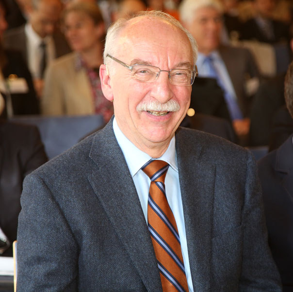 Gerd Gigerenzer bei der 12. Coface Country Risk Conference im Palais Niederösterreich, Mai 2014.